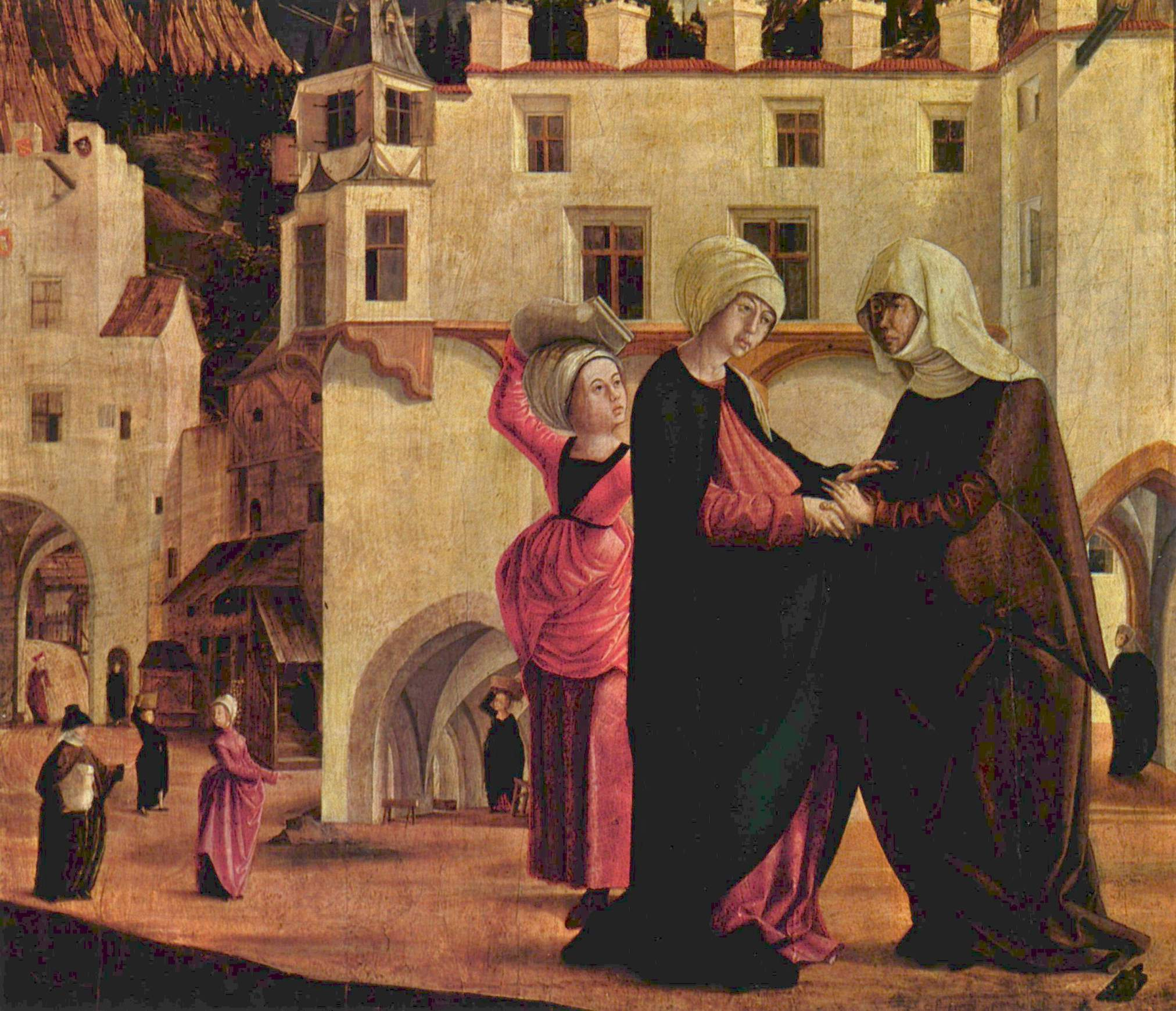 Marienaltar